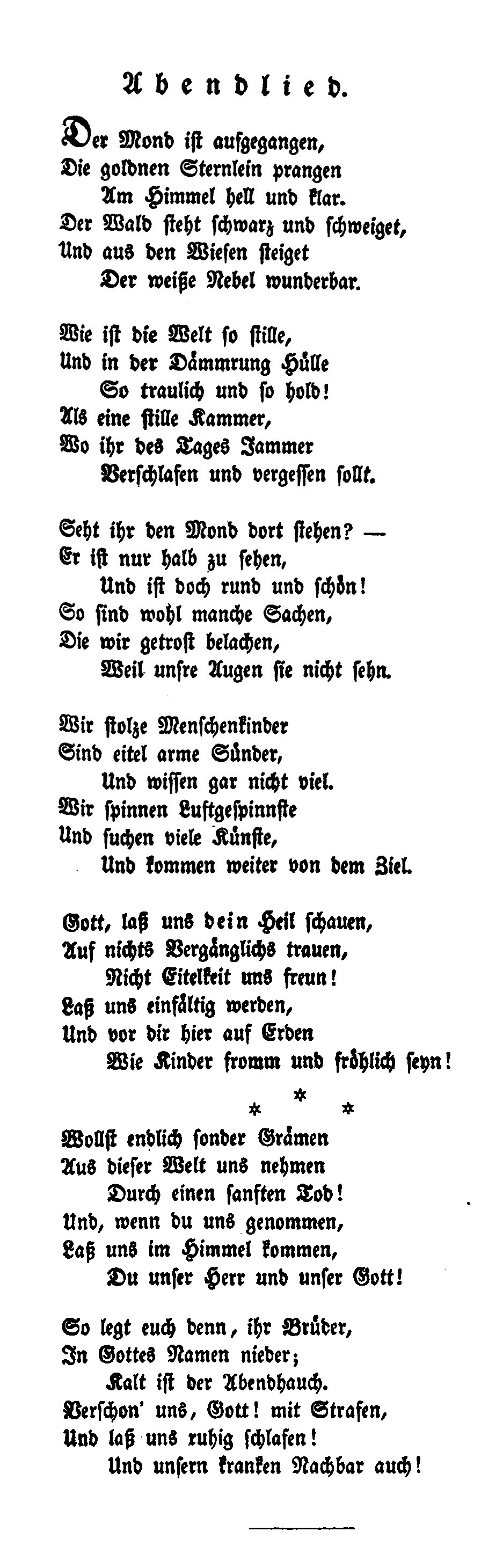 Matthias Claudius: Der Mond ist aufgegangen 1774